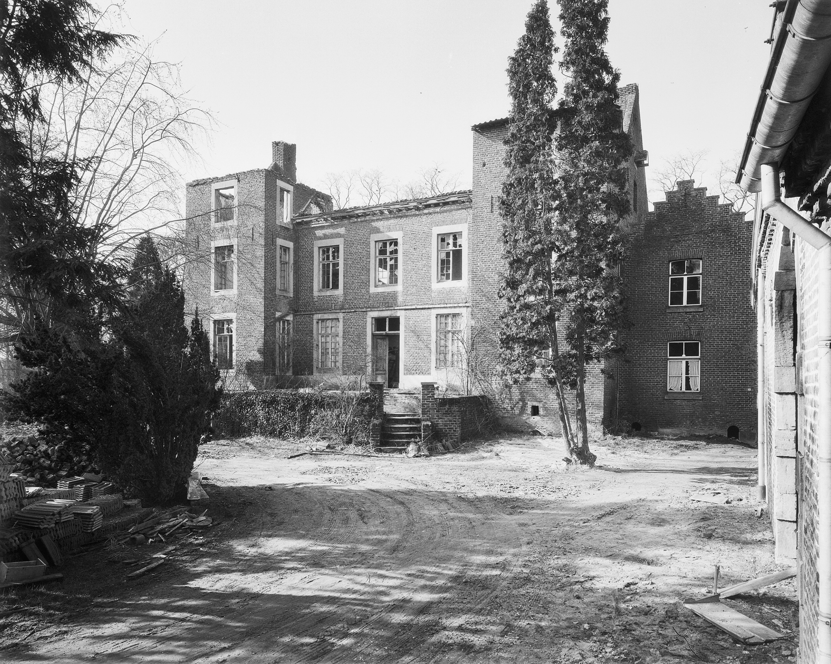 Kasteel: exterieur voorzijde